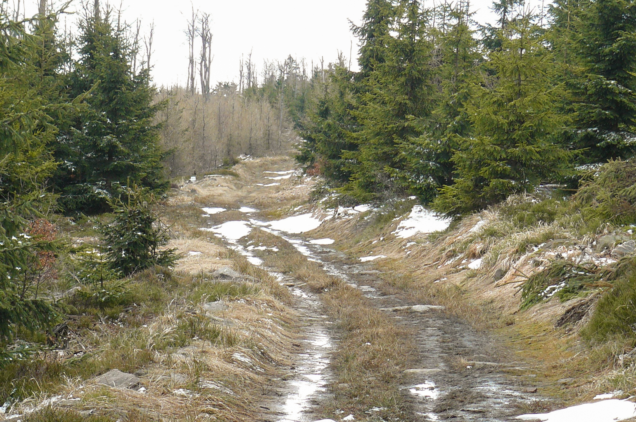 Jagodna - wierzchołek. Droga, którą prowadzi szlak niebieski.